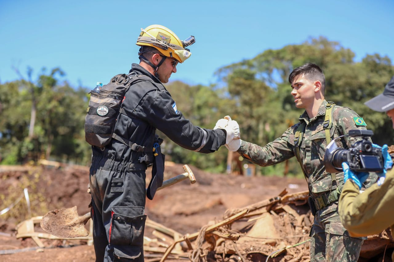 Soldado brasileiro e israelense apertam as mãos